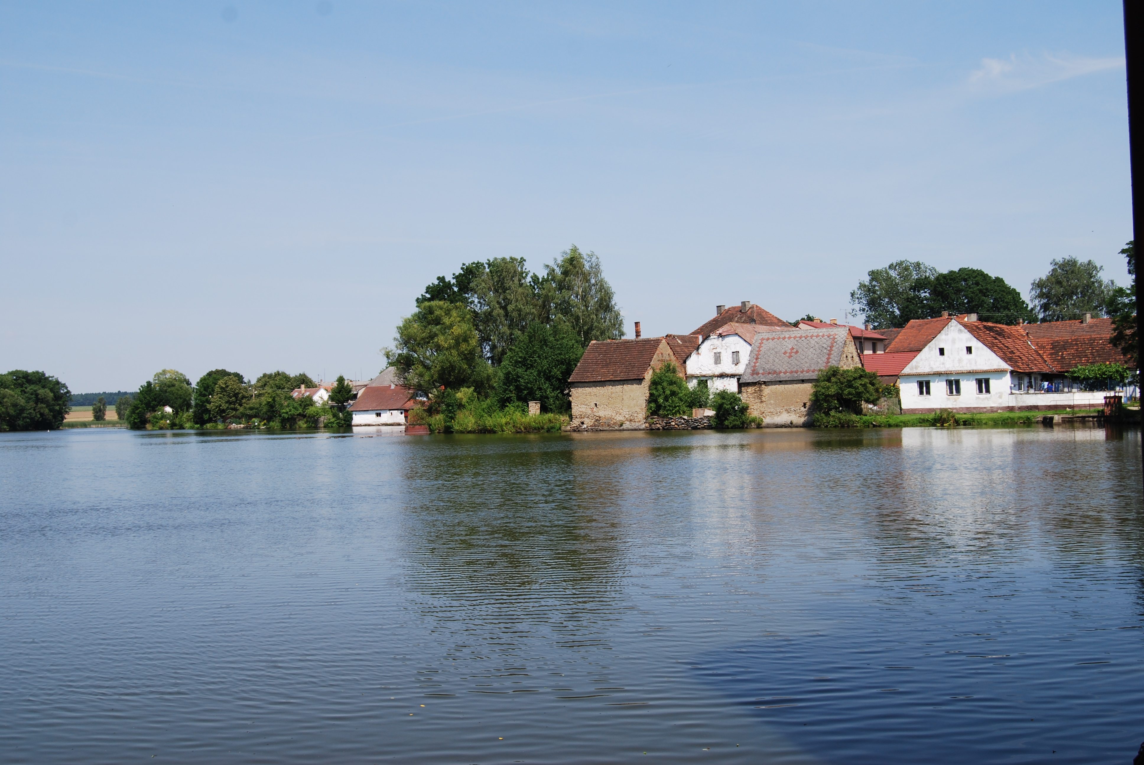 Pohled na obec přes návesní rybník. Veselíčko (okres Písek). Česká republika.